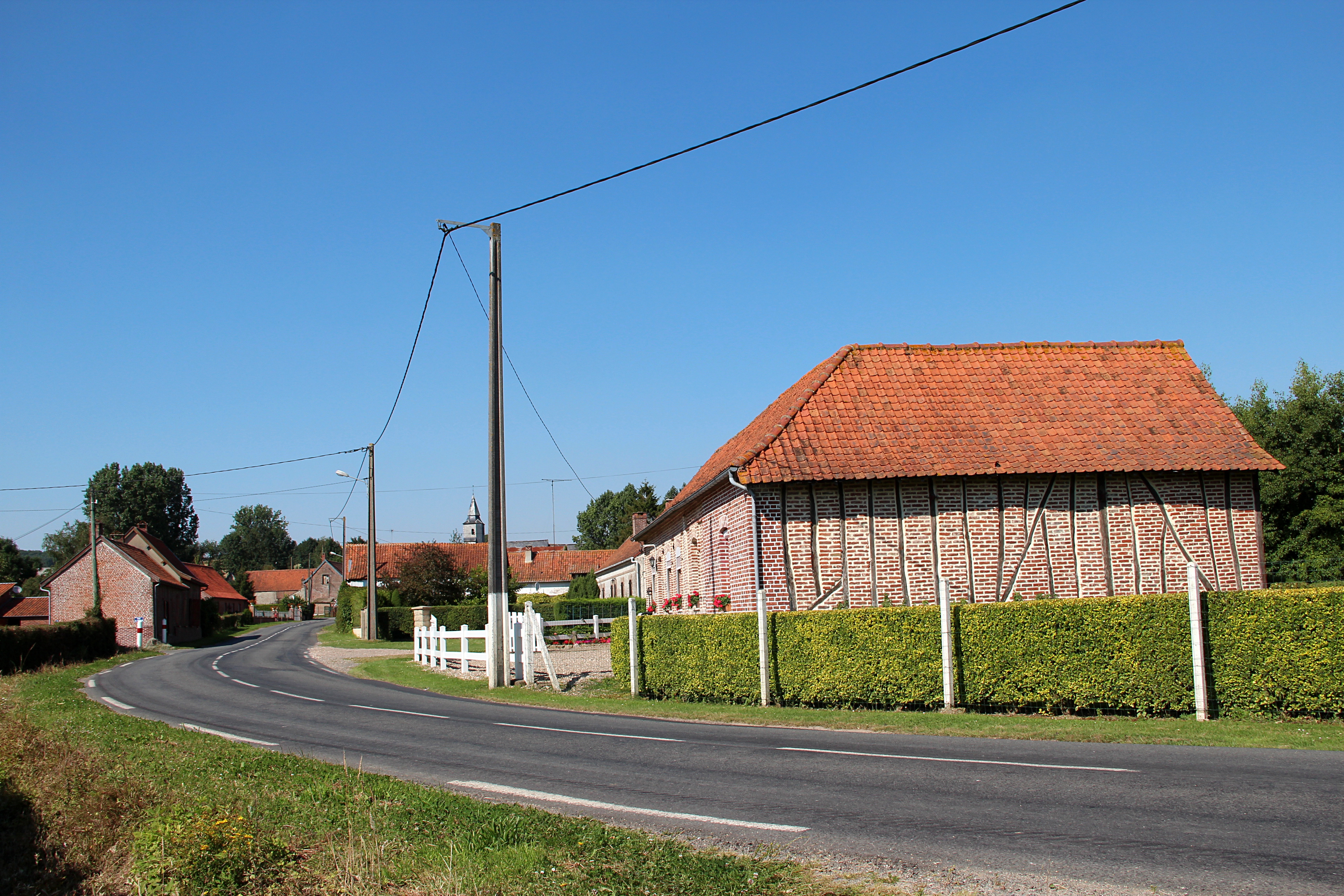 Gennes-Ivergny (Pas-de-Calais - France), le village vu depuis la route de Berck (D119).